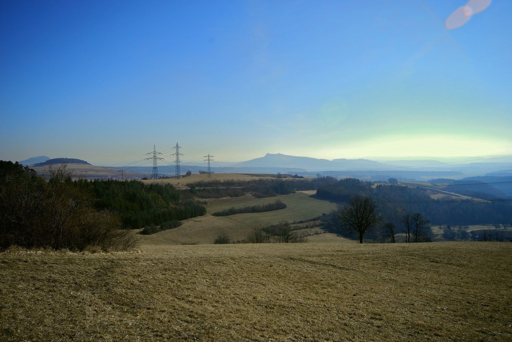 Hegaualb